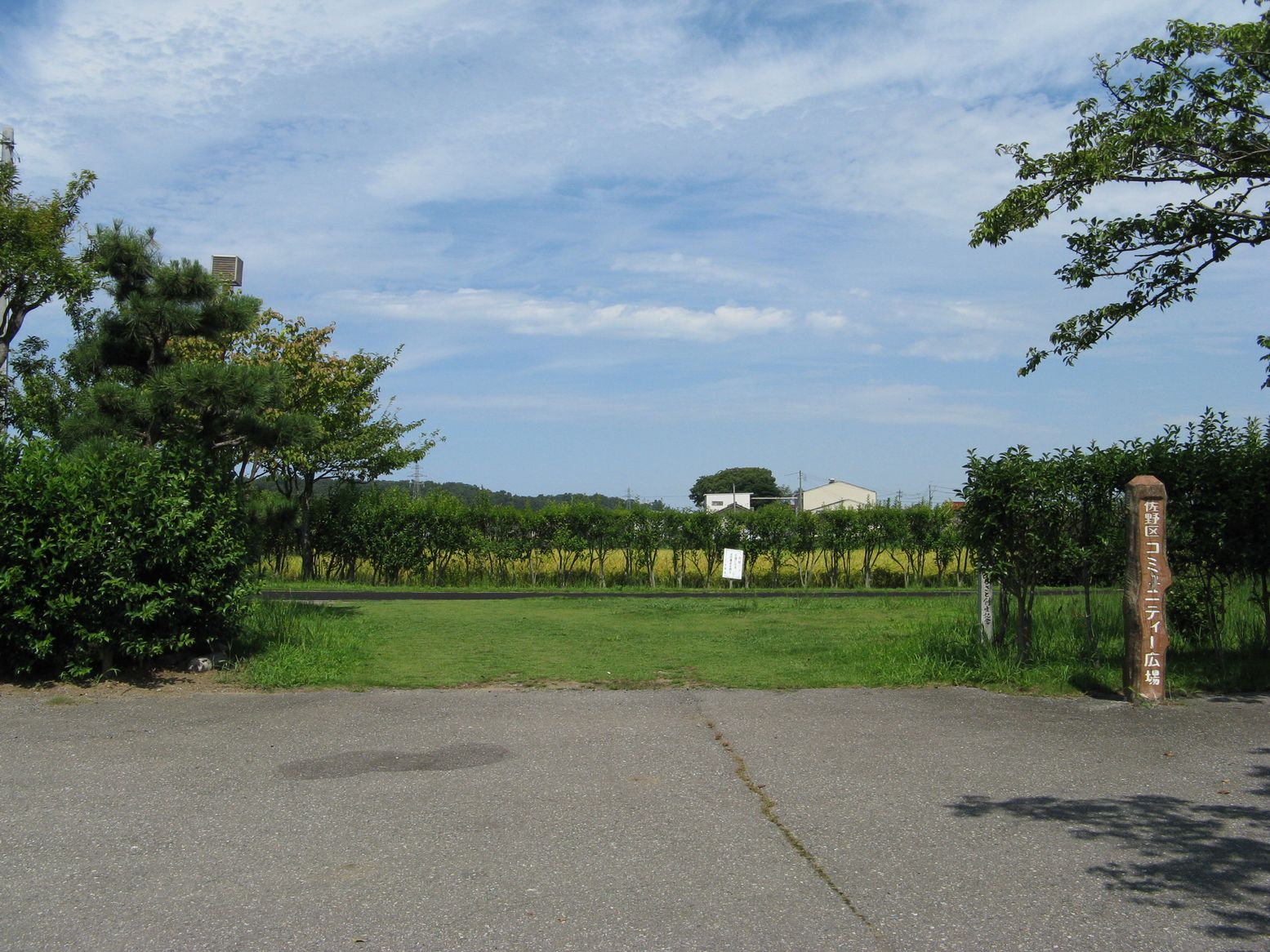 北陸鉄道能美線 加賀佐野駅跡 廃止から28年経過 駅跡を示す遺構・石碑等は無く、廃線敷はサイクリングロードになっている